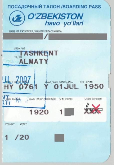 Uzbekistan Airways Boarding Pass